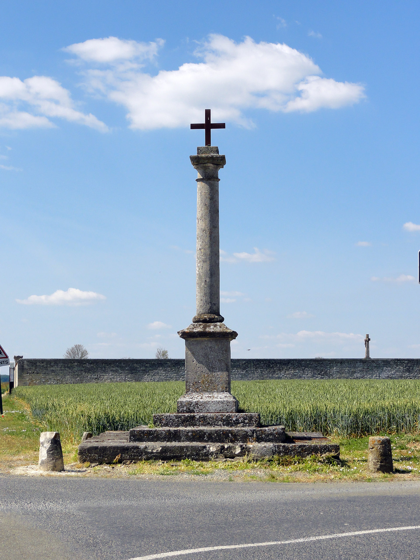 Calvaire à la sortie nord du village, Le Bellay-en-Vexin, France.